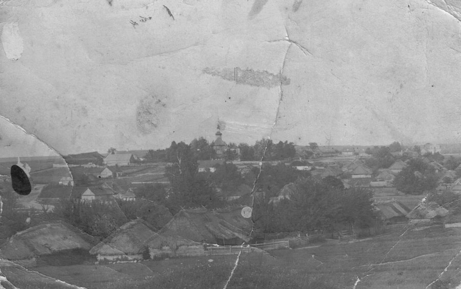 Беларуская (тарашкевіца): Адэльск (Adelsk)